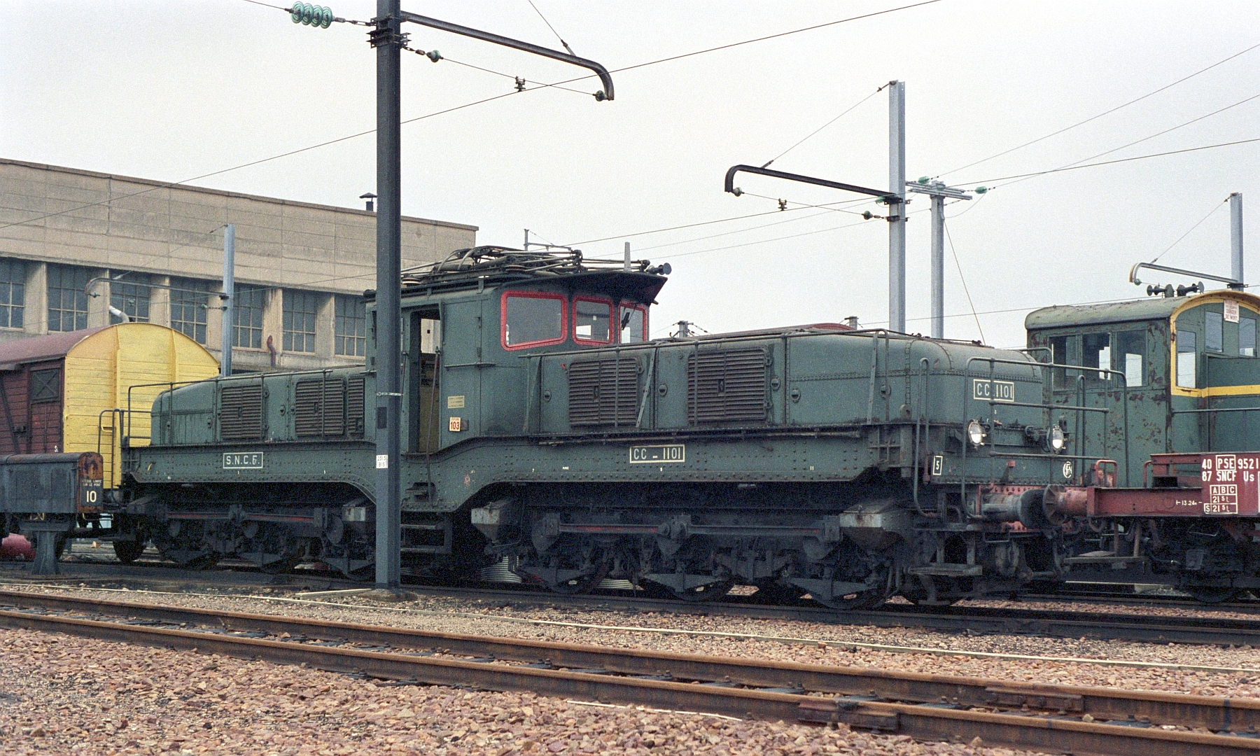 La CC 1101 au dépôt de Villeneuve-St-Georges le 25 avril 1986.